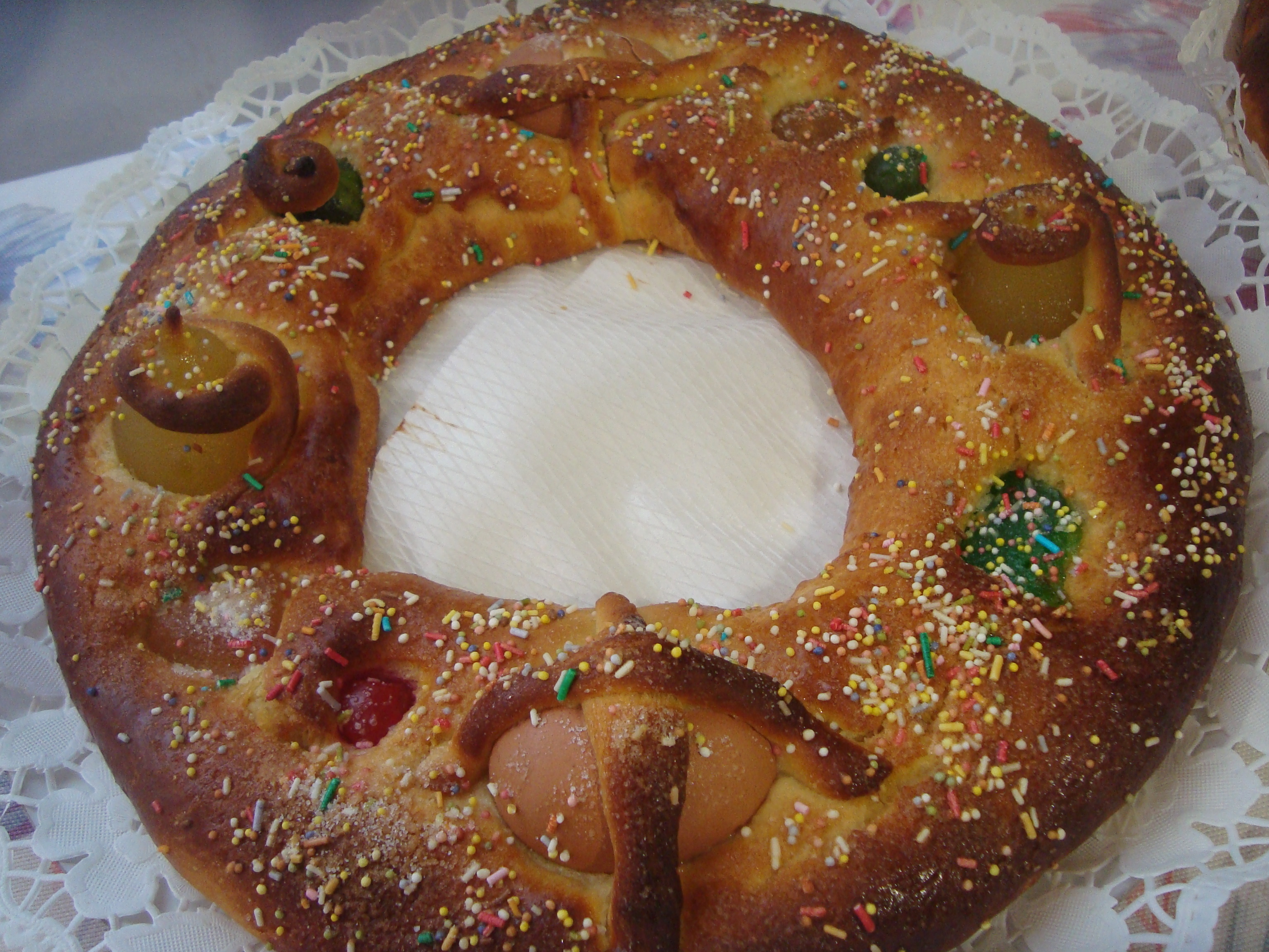 La mona de Pascua es un alimento típico de la repostería dulce de los valencianos, y que antiguamente comian el domingo de Resurrección, ese dia era típico ir a comer la mona de Pascua al campo, como simbolo de que la cuaresma y sus abstinencias gastronómicas se han terminado.